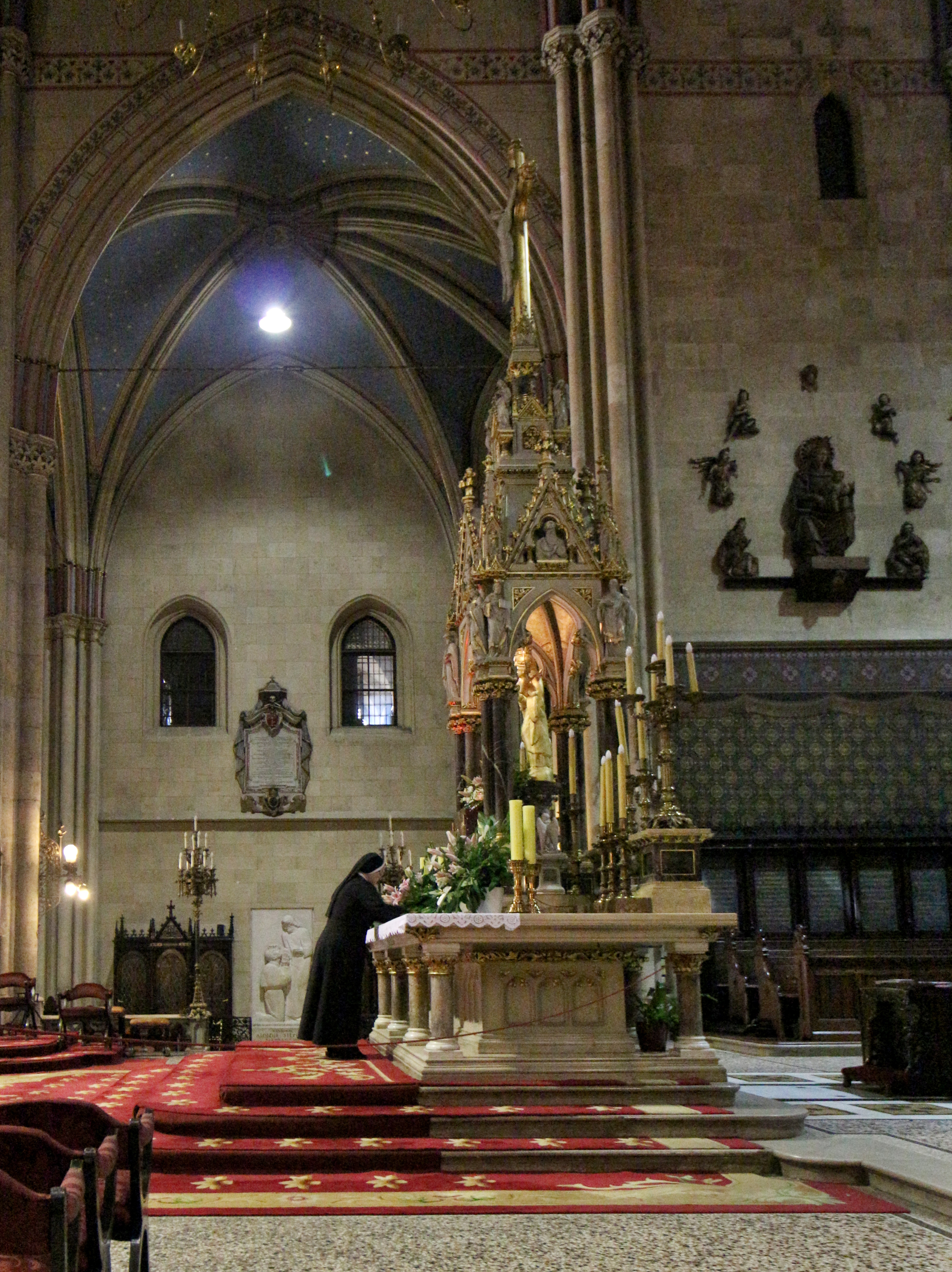 Záhřeb, Kapitol, katedrála a okolí